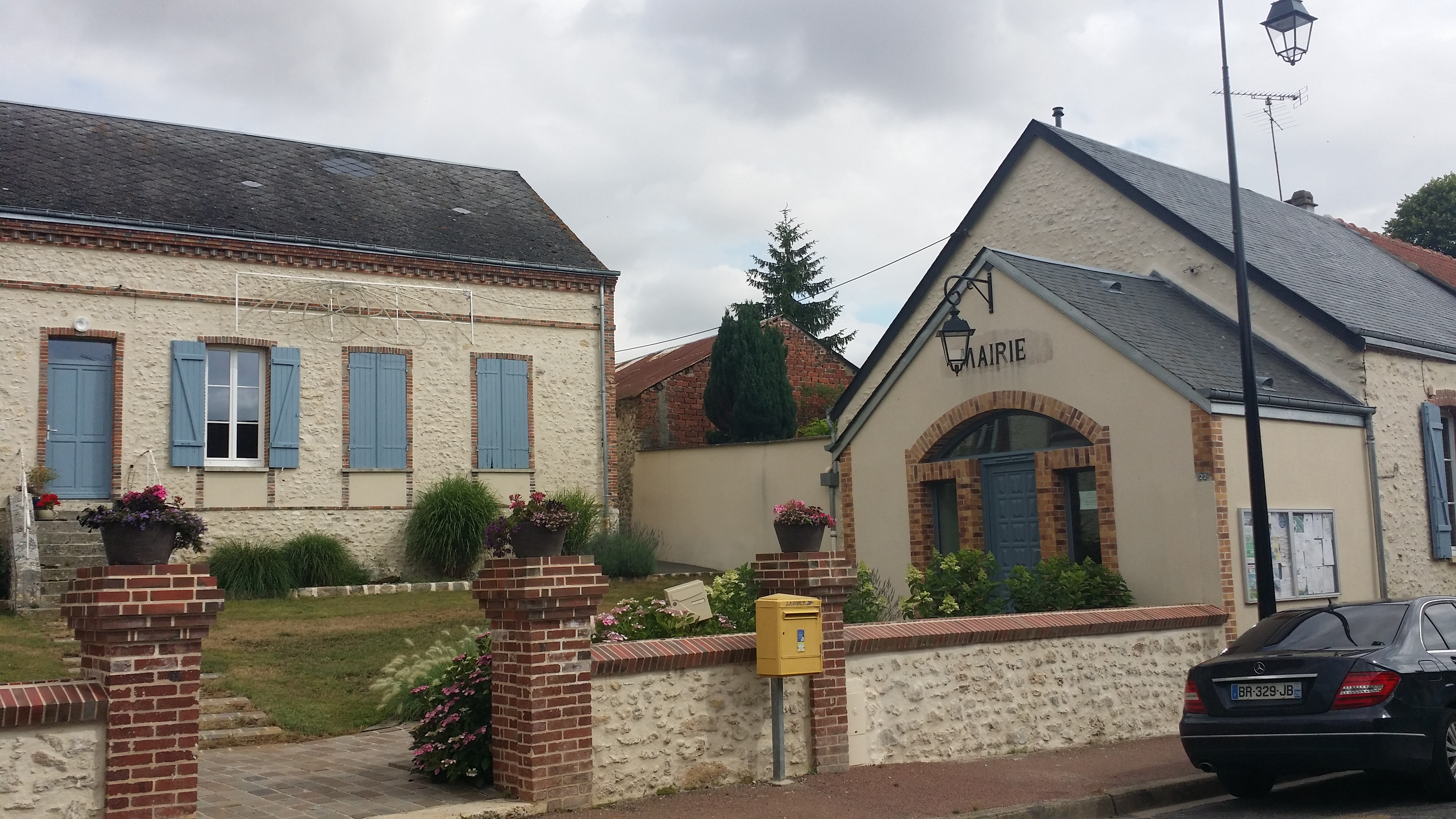 Mairie